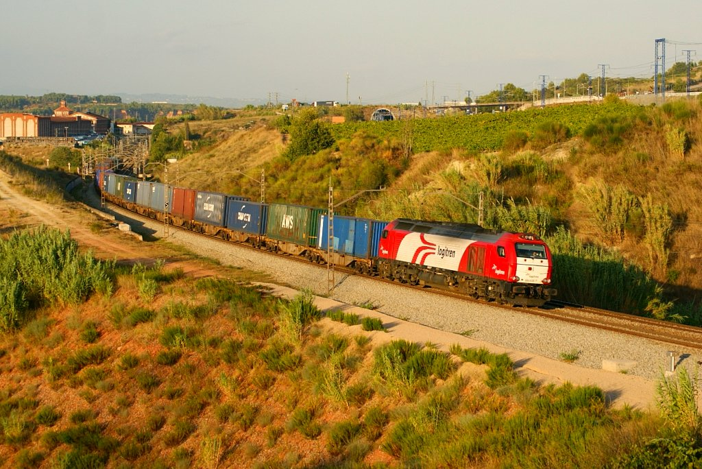 Locomotora 335.028 de Logitren amb el Teco Barcelona - Bilbao al seu pas per Sant Sadurní d'Anoia.